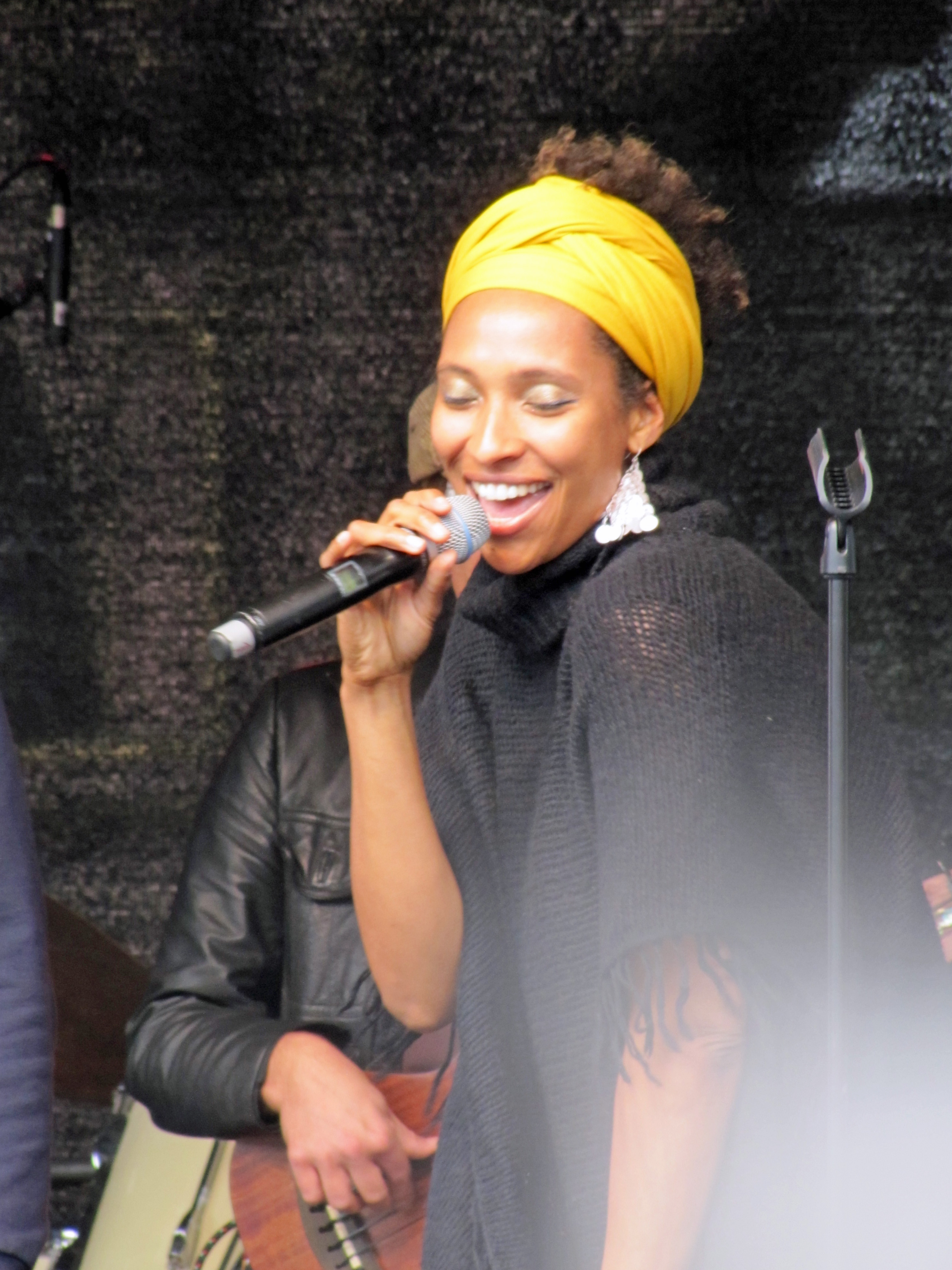 Tokunbo Akinro von Tok Tok Tok, 2012 bei Jazz zum Dritten auf dem Römerberg in Ffm.